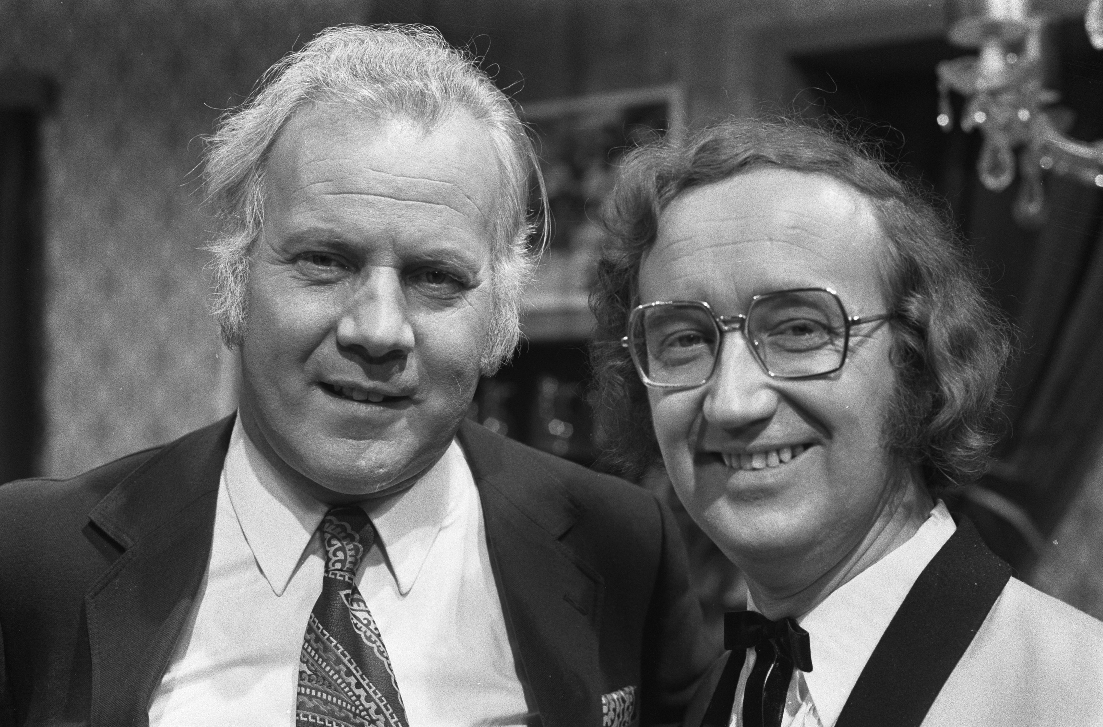 Collectie / Archief : Fotocollectie Anefo Reportage / Serie : Fred Haché show van de VPRO Beschrijving : Fred Haché show van de VPRO. Links Harry Touw als Fred Haché, rechts IJf Blokker als Barend Servet Datum : 12 januari 1972 Persoonsnaam : Blokker, IJf, Touw, Harry Instellingsnaam : VPRO Fotograaf : Fotograaf Onbekend / Anefo Auteursrechthebbende : Nationaal Archief Materiaalsoort : Negatief (zwart/wit) Nummer archiefinventaris : bekijk toegang 2.24.01.05 Bestanddeelnummer : 925-3061 Reacties Geplaatst door Televisie-show fan op 30 december 2017 - 14:28. Mogelijk een scene uit de show 'Het verjaardagsfeestje met klapsigaren' uitgezonden op 27 januari 1972